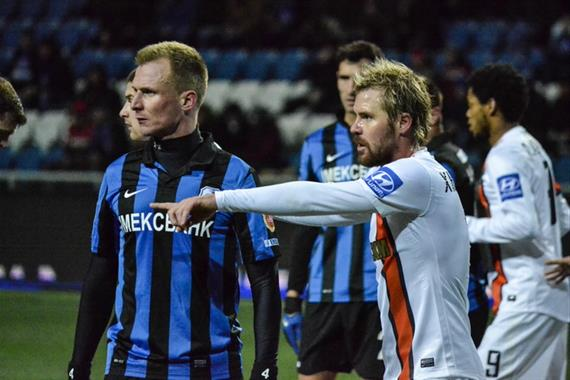 Маркус Берґер (ліворуч, Чорноморець Одеса) та Томаш Гюбшман (праворуч, Шахтар Донецьк) 4 грудня 2013 року.